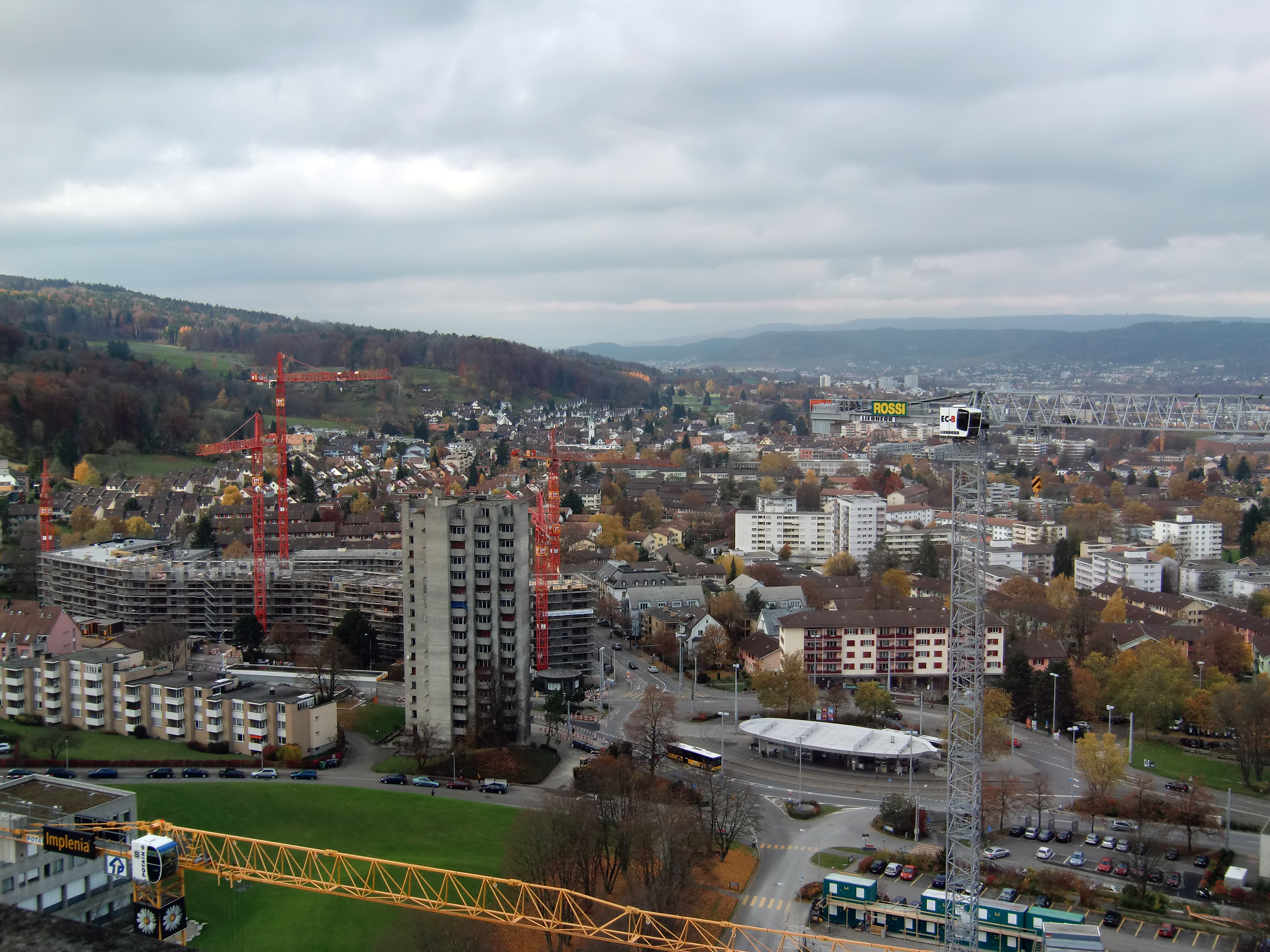 Sicht auf den Triemli-Platz in Zürich vom Stadtspital Triemli